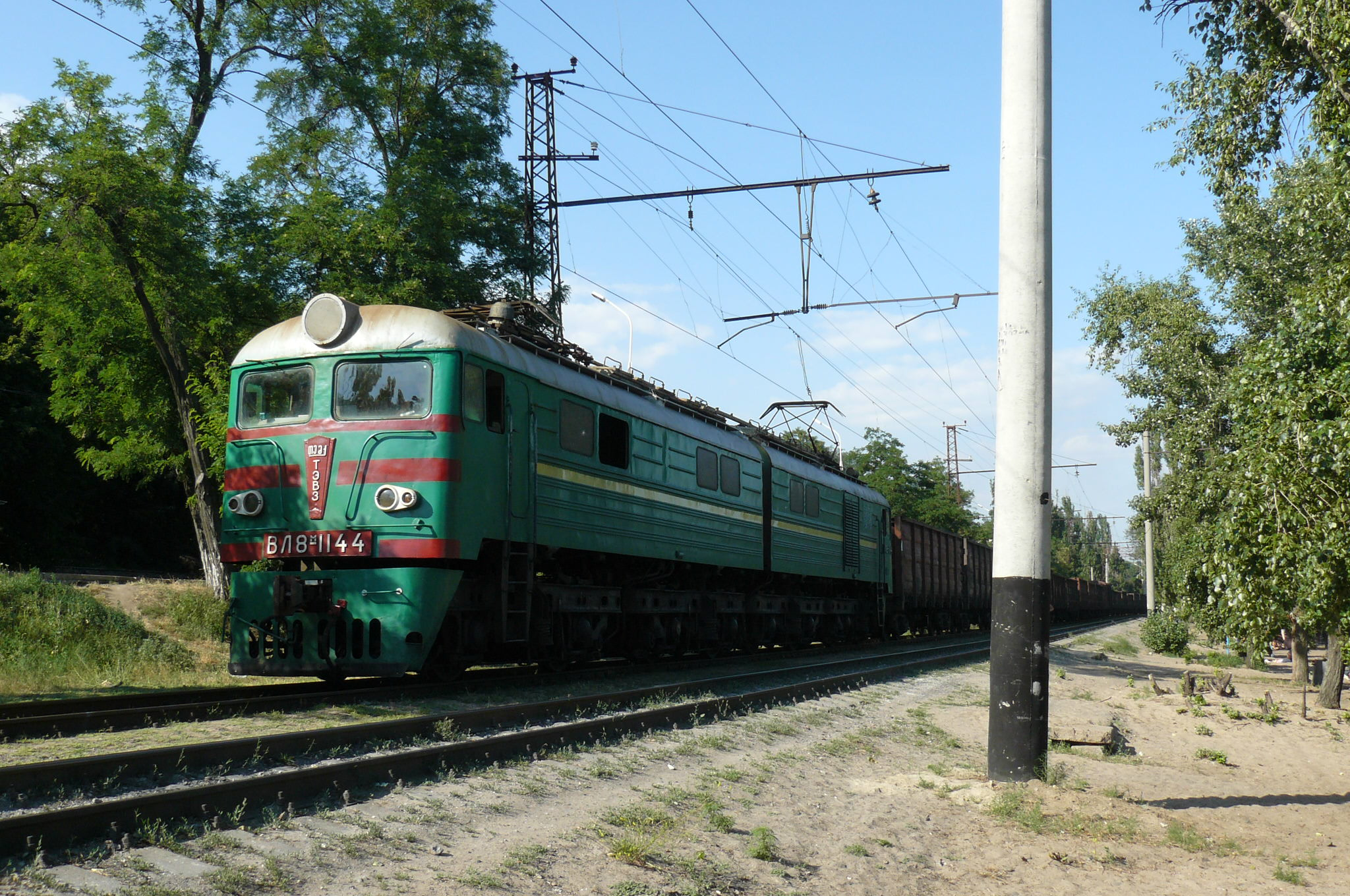 Mariupol - linia kolejowa wzdłuż plaży.